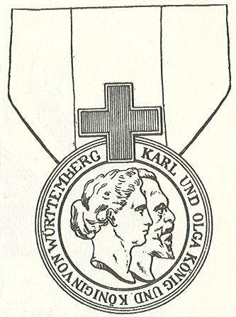 Tekening van Gritzner 1893